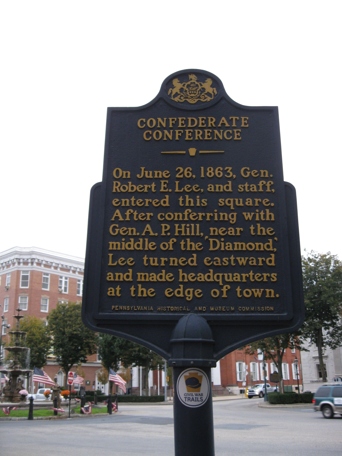 Chambersburg, Pennsylvania